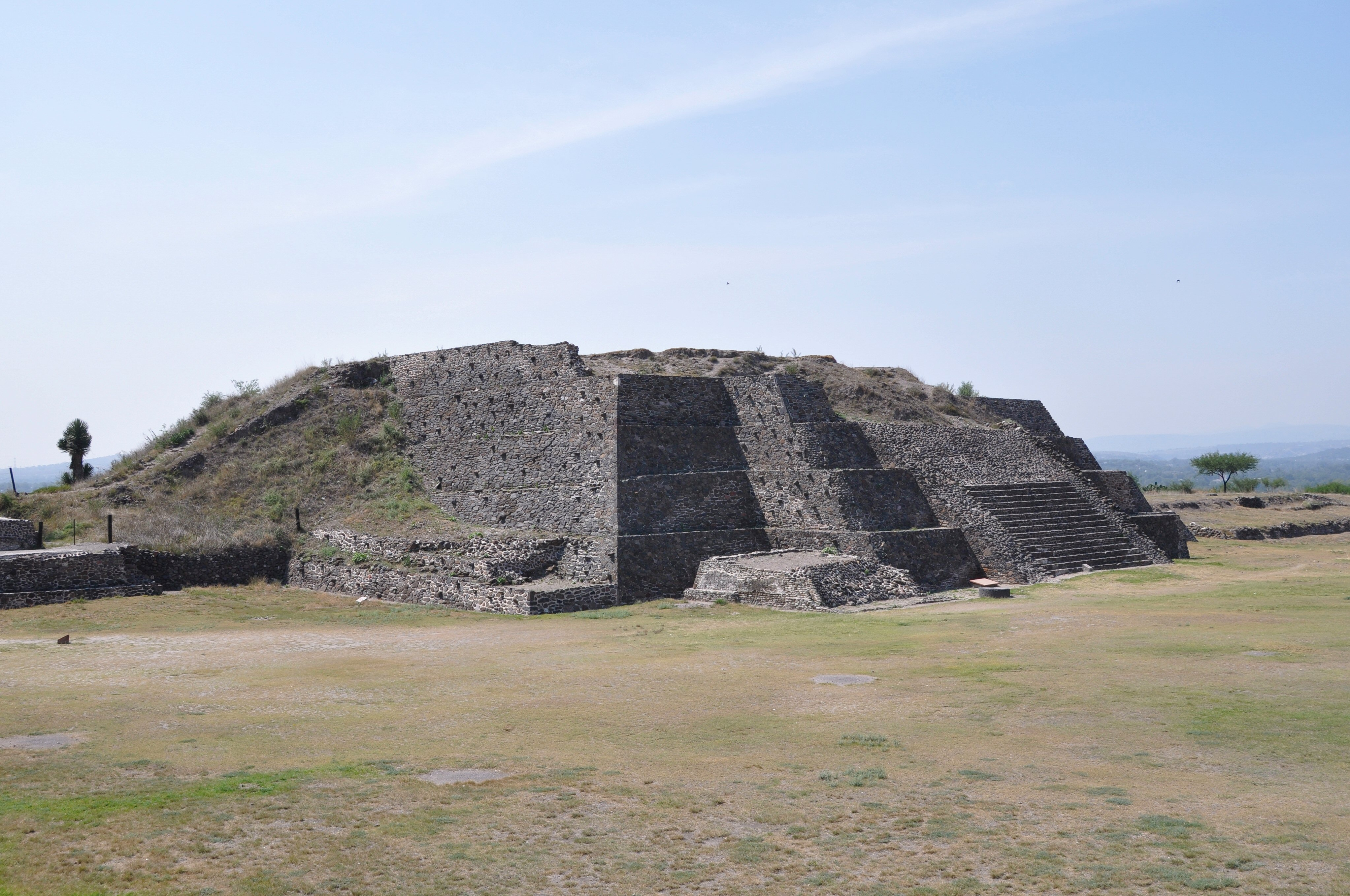 Tula de Allende, Mexico